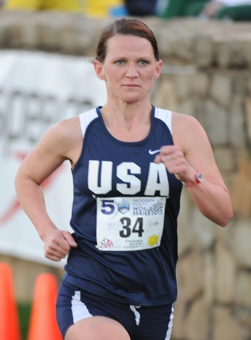 AAB_7364